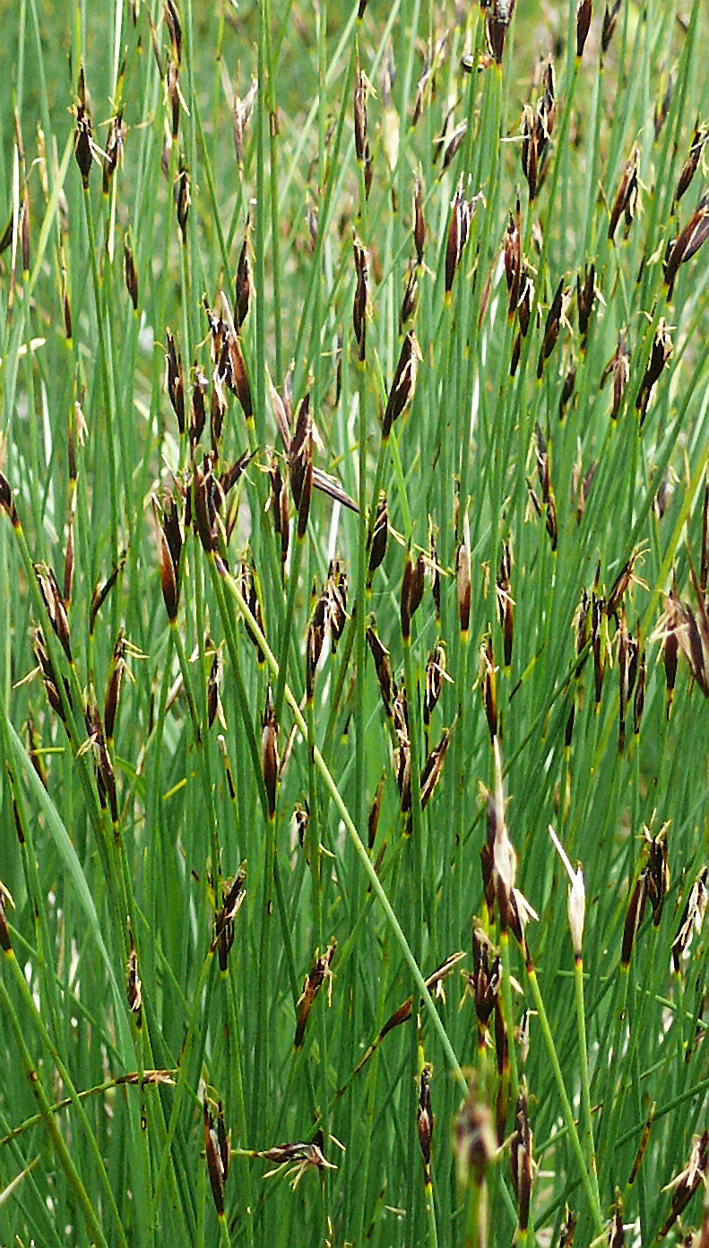 Schoenus ferrugineus, Oberschwaben, Deutschland